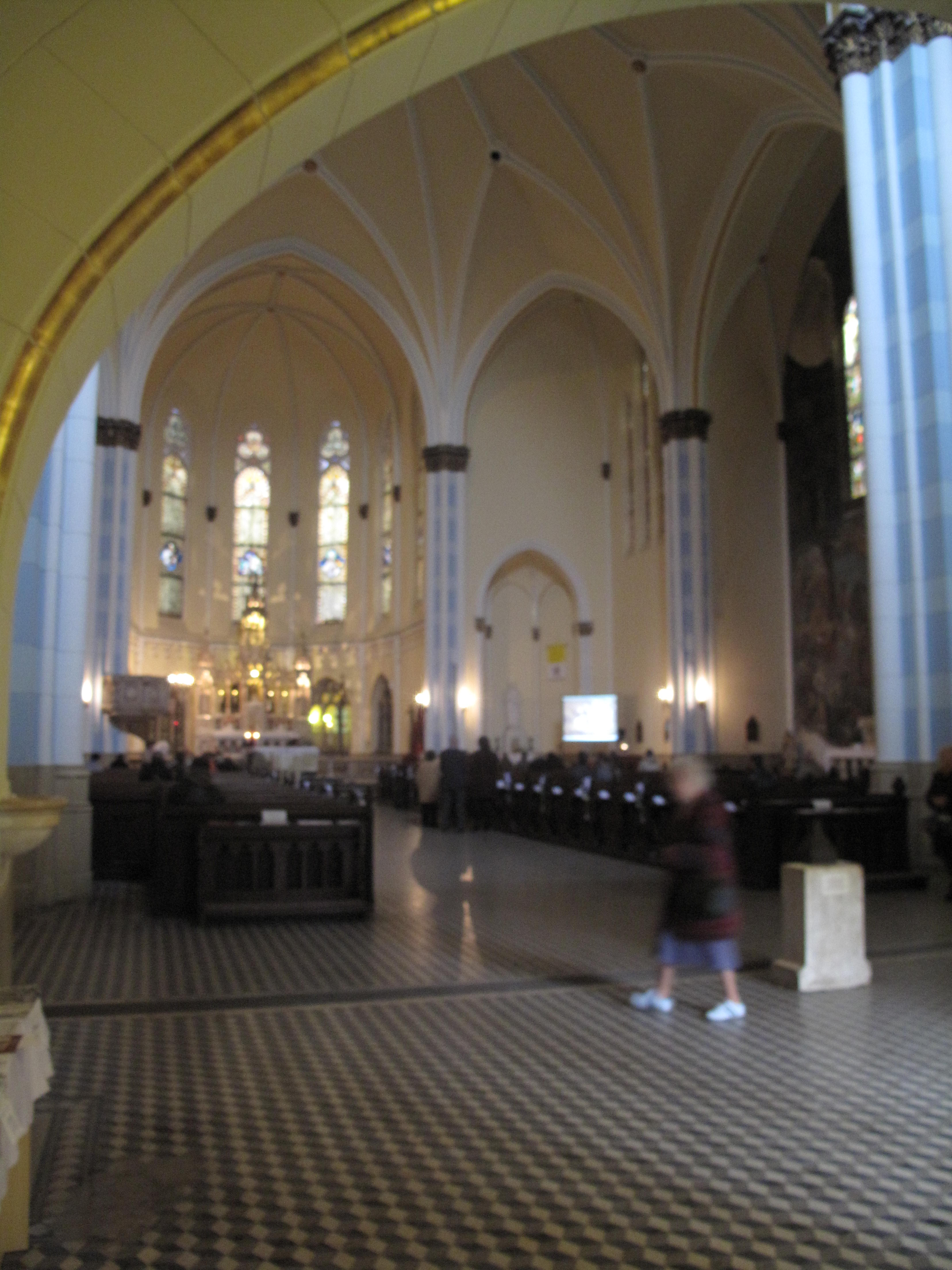 Budapešť